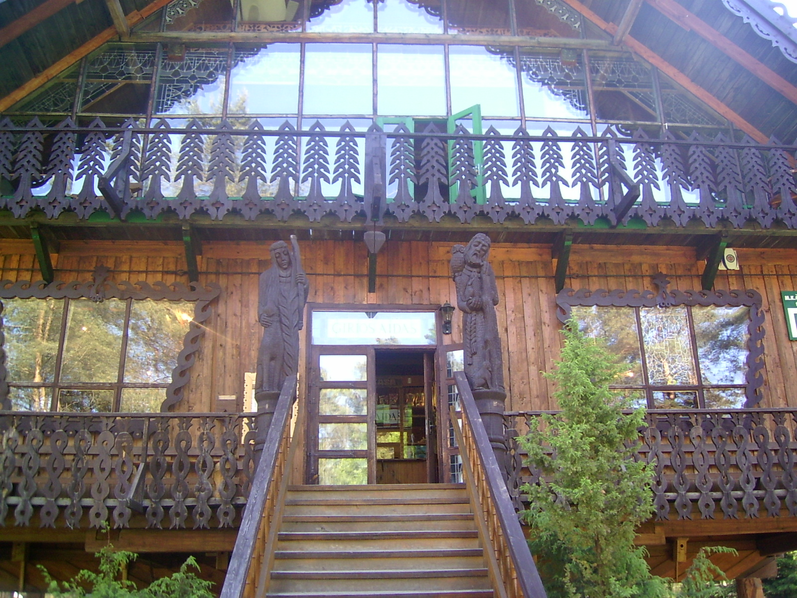 Miško muziejaus 'Girios aidas' fasadas, Druskininkai.